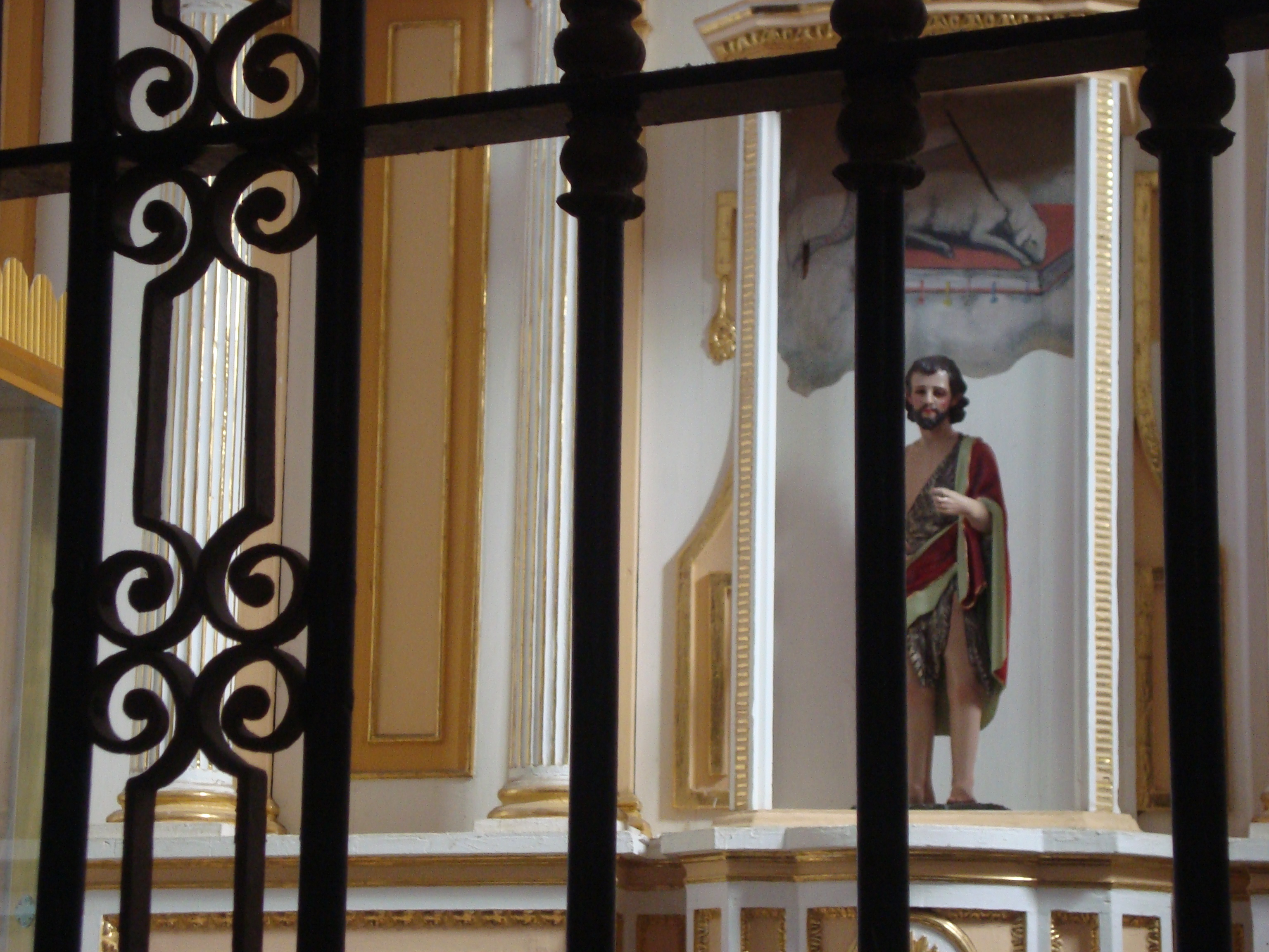 Imagen de San Juan Bautista en el templo del mismo nombre en la ciudad de Acatlán de Osorio (Puebla, México)